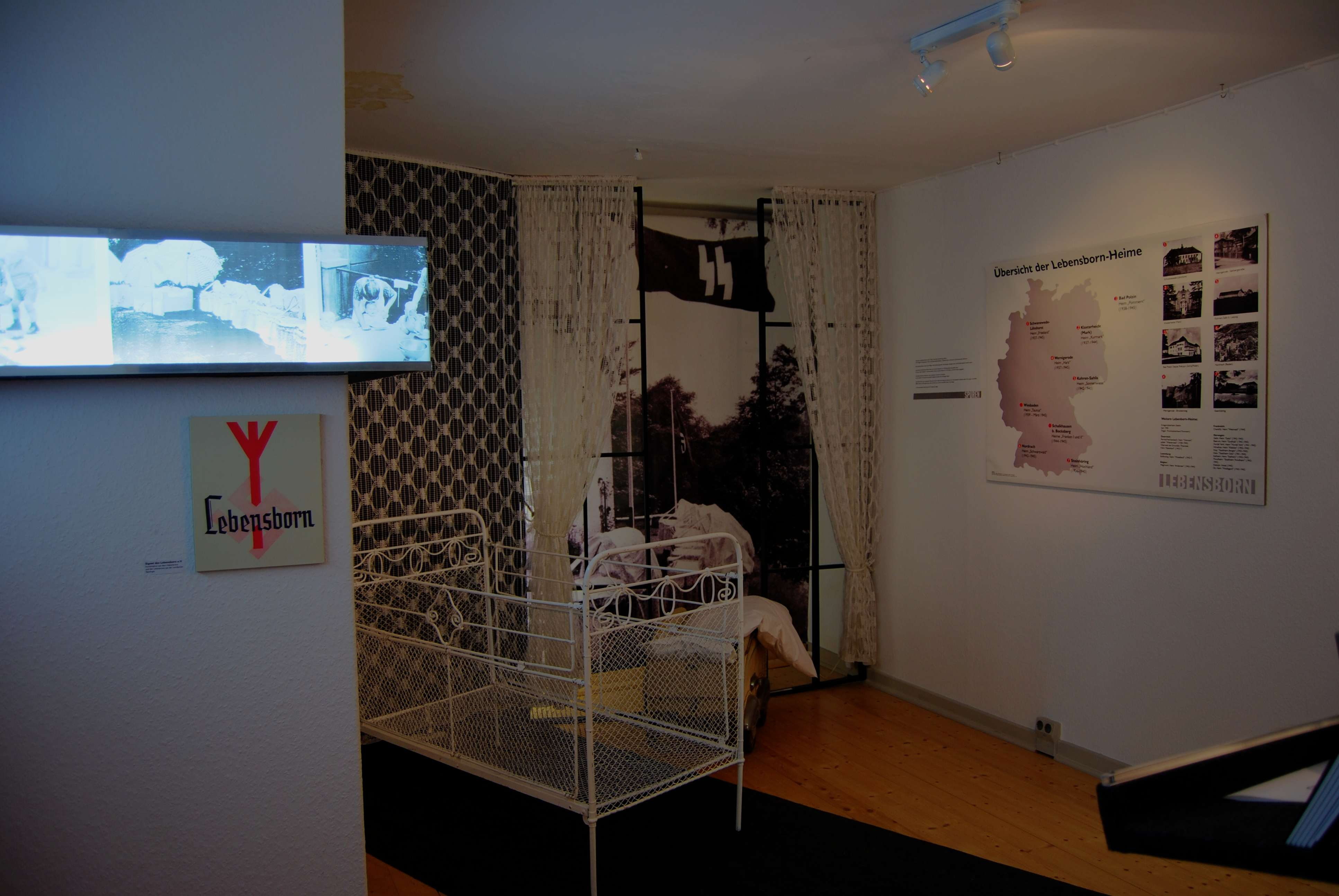 Teil des Ausstellungsbereichs zum Thema "Lebensborn" in der Gedenkstätte Baracke Wilhelmine in Schwanewede-Neuenkirchen in Niedersachsen/Deutschland.